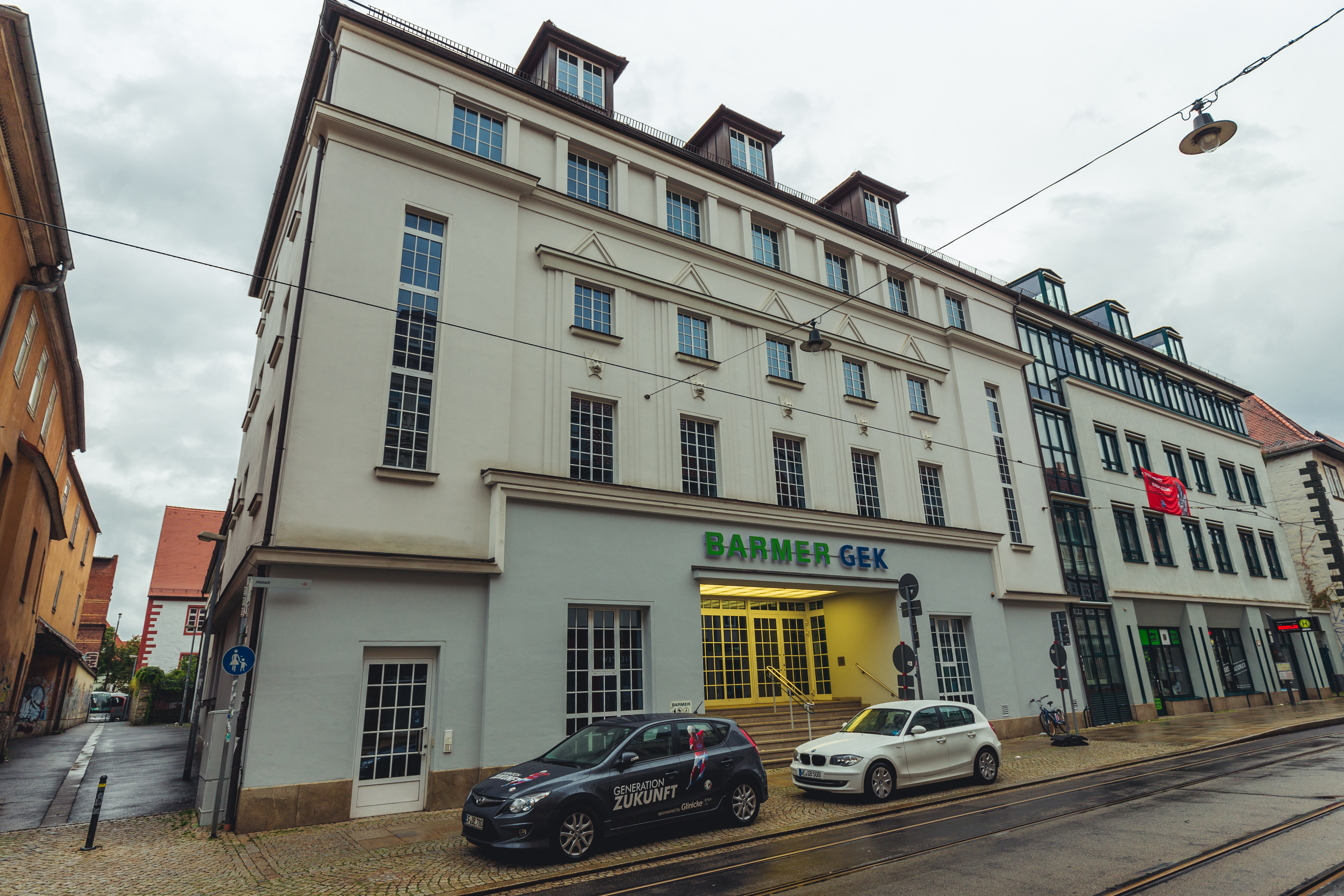 WLM-Fototour Erfurt 2014 Dieses Foto wurde im Rahmen der WLM-Fototour 2014 in Erfurt erstellt, die vom 29. bis 31. August 2014 zum Auftakt des Wettbewerbs Wiki Loves Monuments 2014 statt fand. The making of this document was supported by the Community-Budget of Wikimedia Germany. Denkmalgeschütztes Haus Erfurt.Johannesstrasse 164